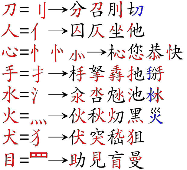 Quelques radicaux de caractères chinois. Les radicaux apparaissent en rouge lorsqu'ils ont la forme attendue, en bleu pour les graphies en composition irrégulières. Vincent Ramos